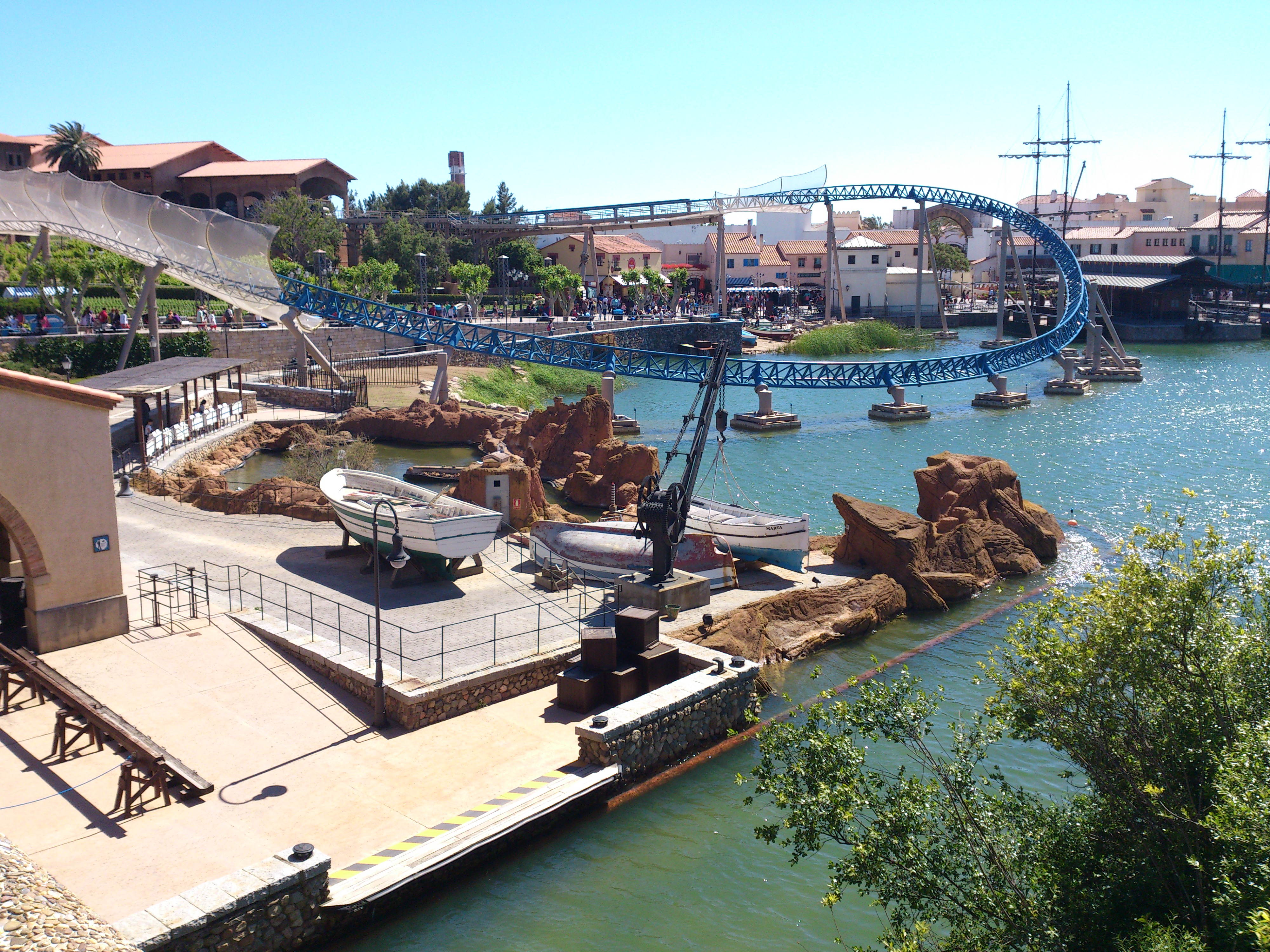 Na apsolventskoj ekskurziji. Jedan od najboljih doživljaja!